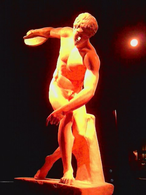 Discobolo (original) en Museo Arqueológico de Alicante (España).